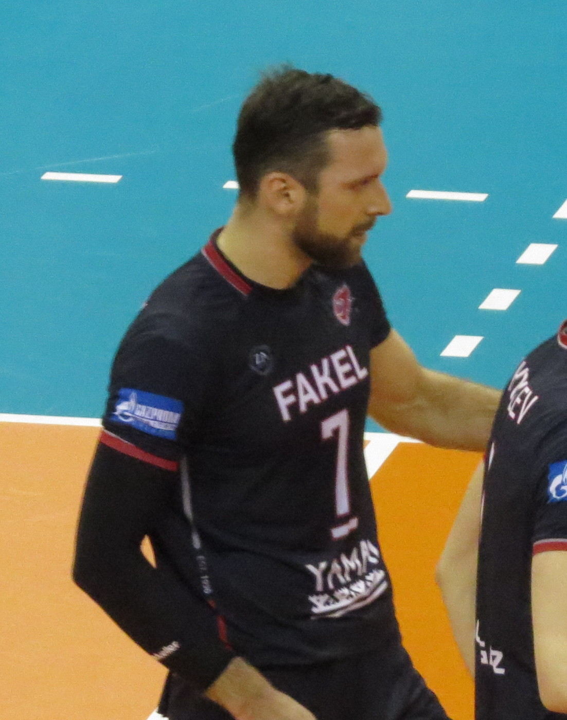 Photos réalisées lors de la finale aller de la Challenge Cup entre le Chaumont Volley-Ball 52 et le Fakel Novy Ourengoï à Paris (salle Charpy) 7 KOLODINSKY Igor 9 IAKOVLEV Ivan